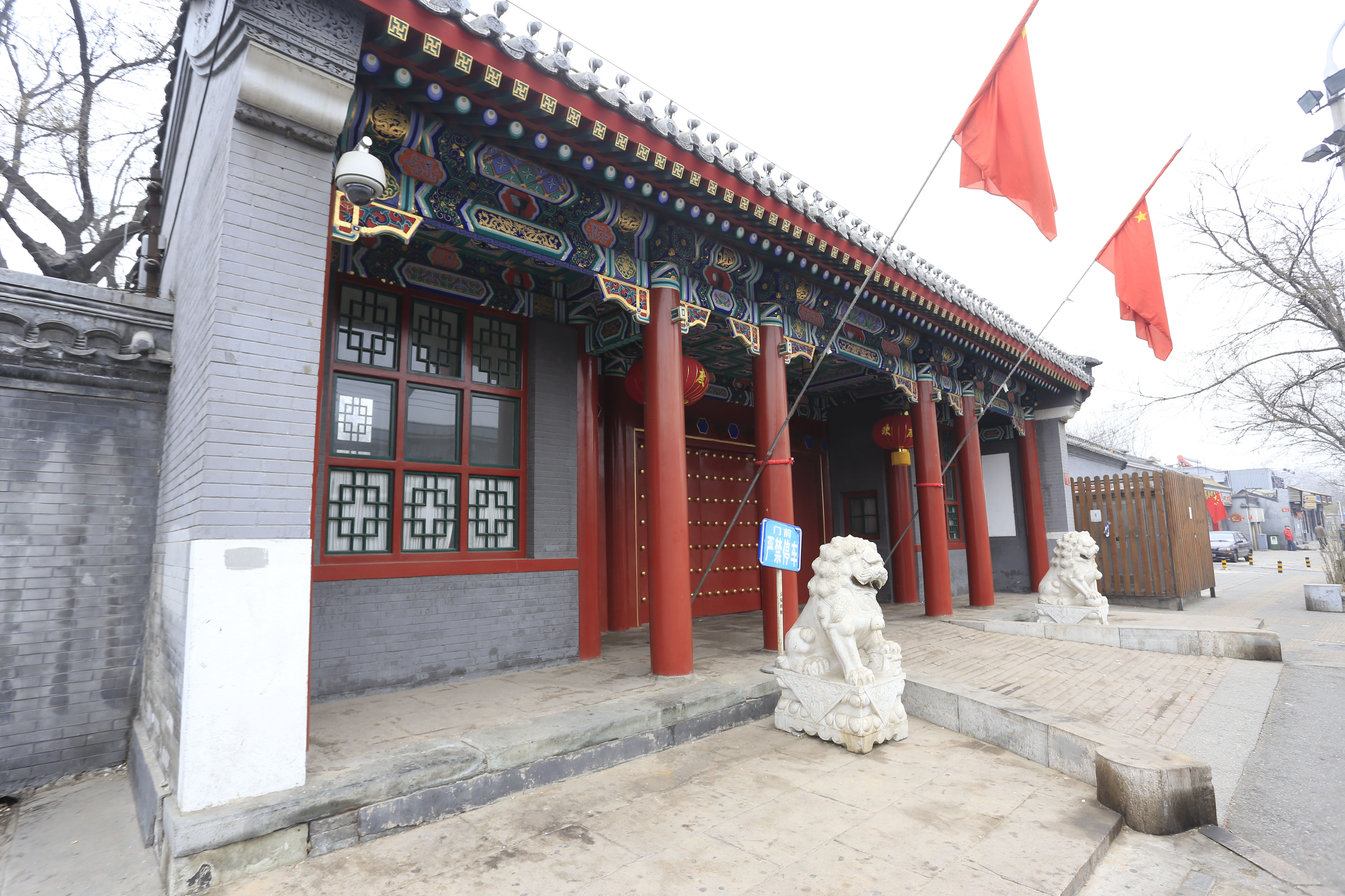 北京孙中山行馆,，位于北京市东城区张自忠路23号